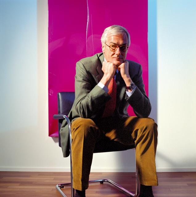 Verwaltungsratspräsident der Ringier Holding AG